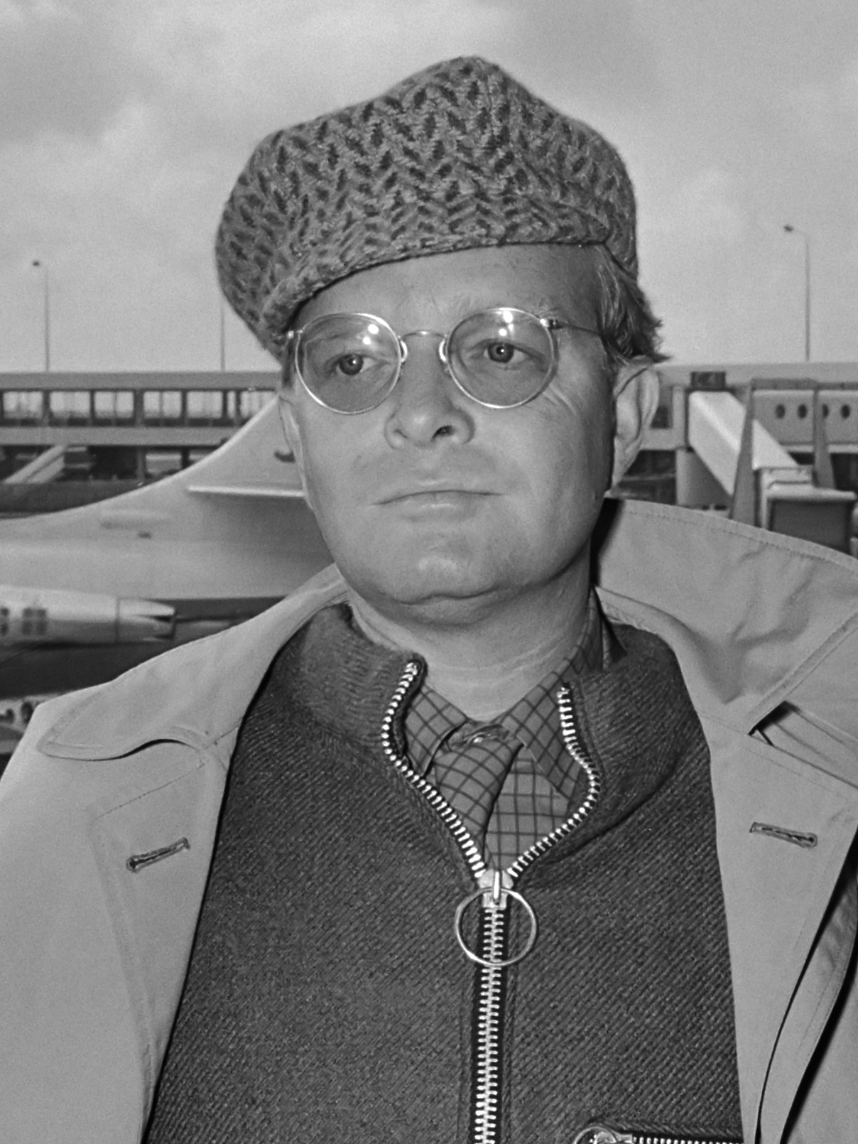 Aankomst schrijver Truman Capote (links) en regisseur Richard Brooks op Schiphol voor de première van de film "In Koelen Bloede" ("In Cold Blood")